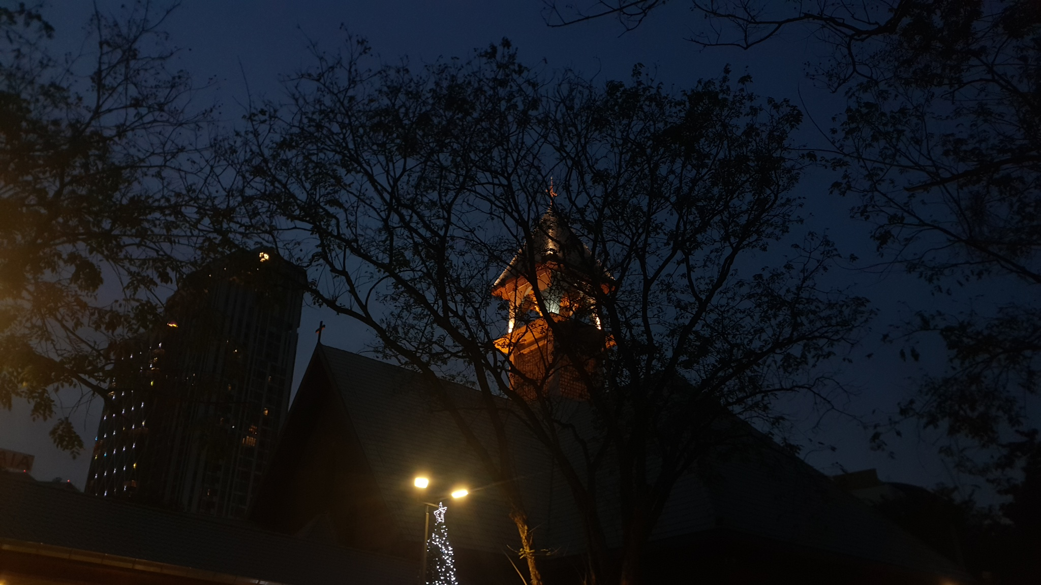 โบสถ์เซนต์หลุยส์ยามค่ำคืน